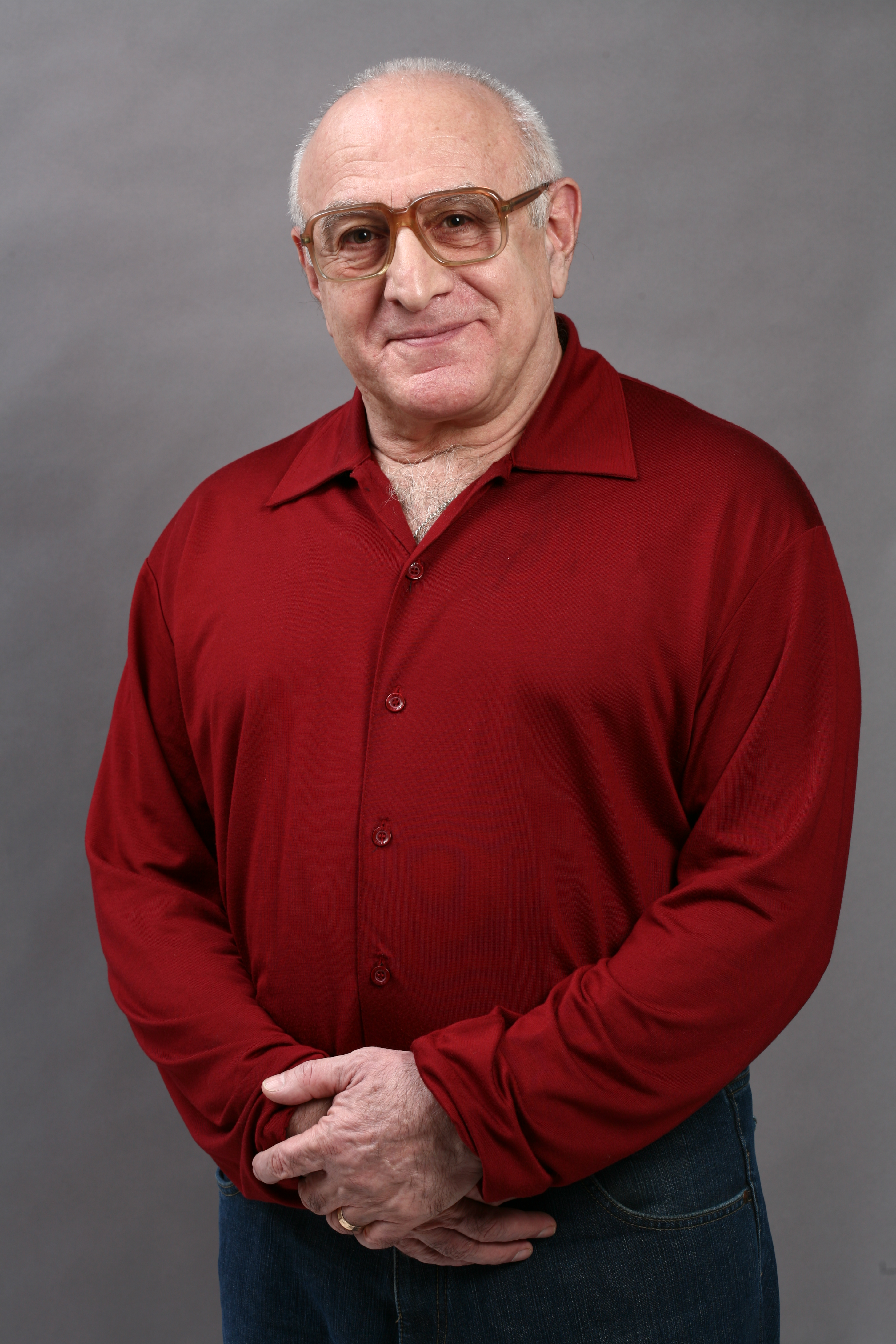 Мое фото